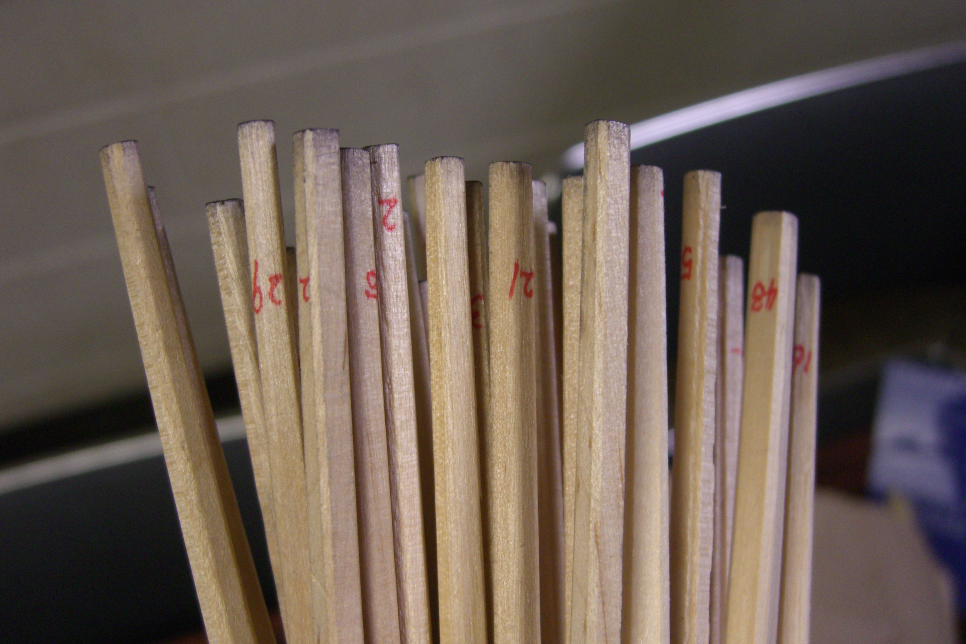 俺が１年目の時から使ってる。